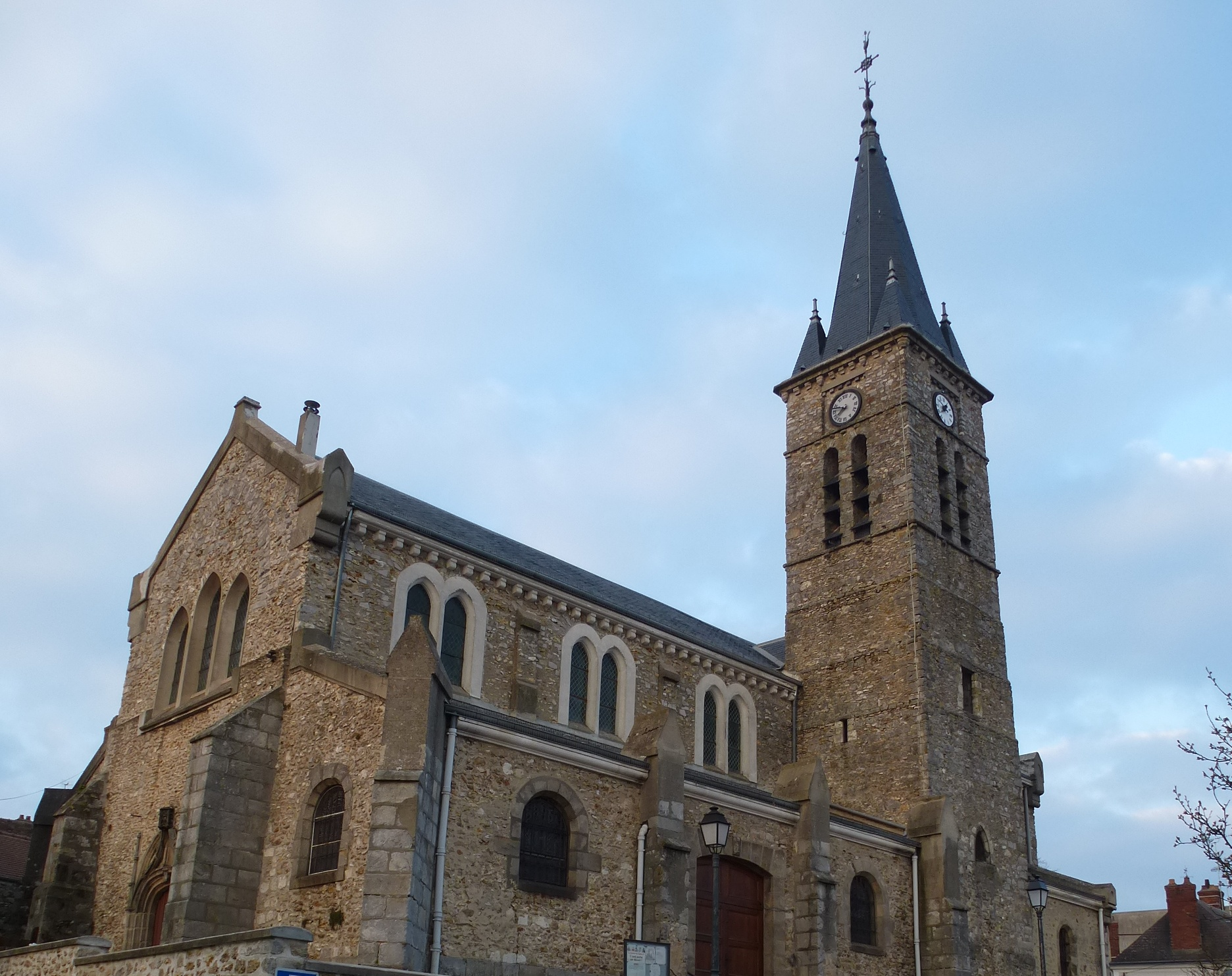 Église Saint-Chéron de Saint-Chéron. (Essonne, région Île-de-France).